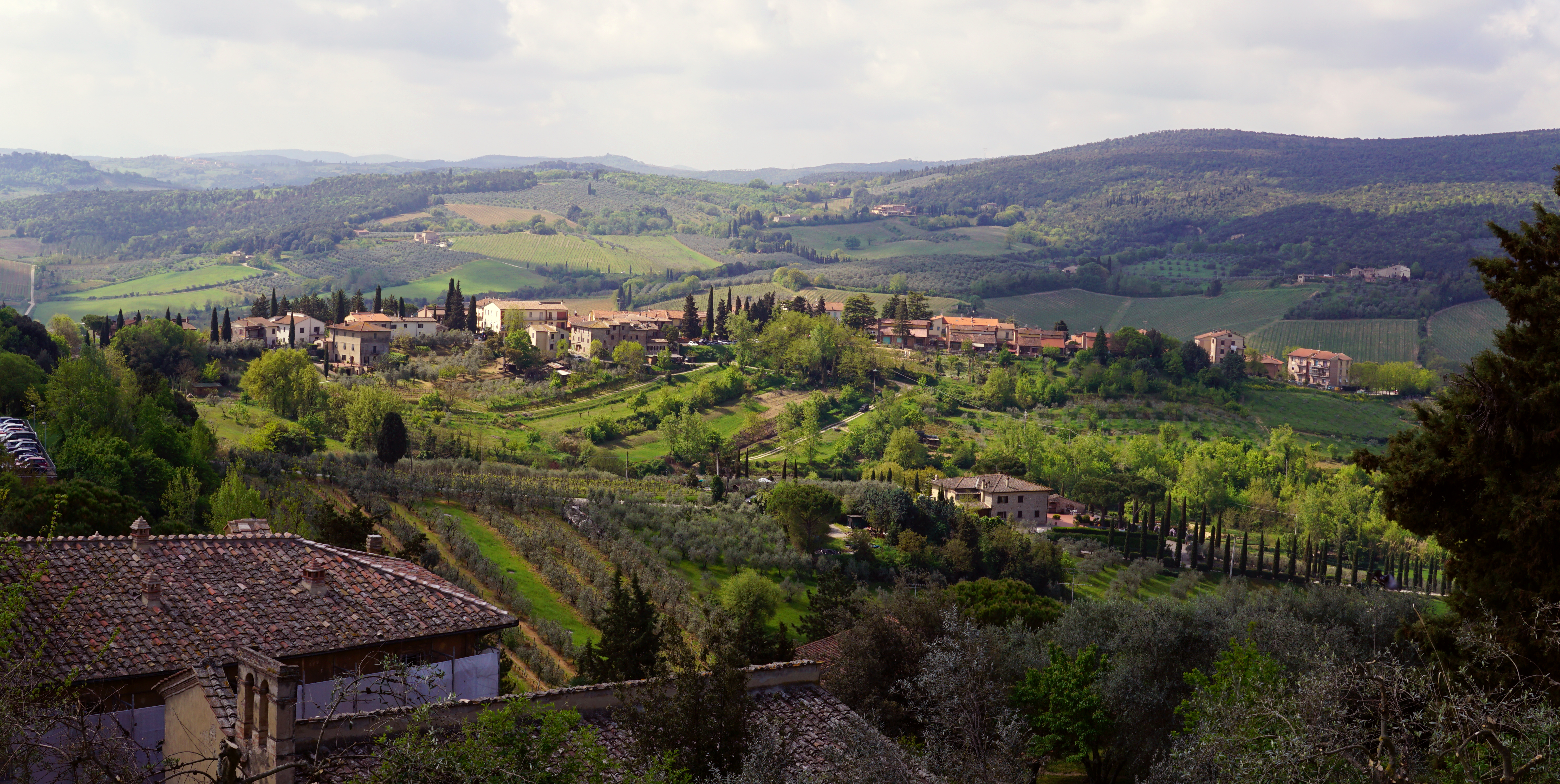 Lucía García González